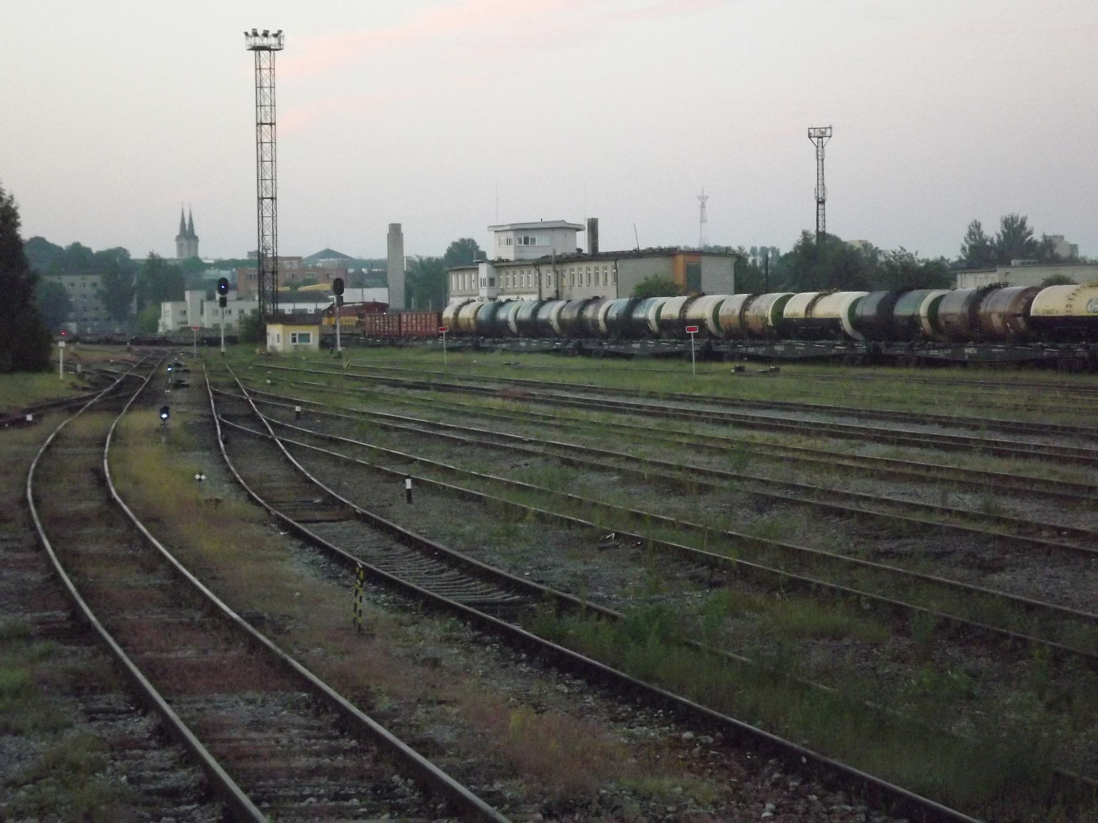 Haruteed.